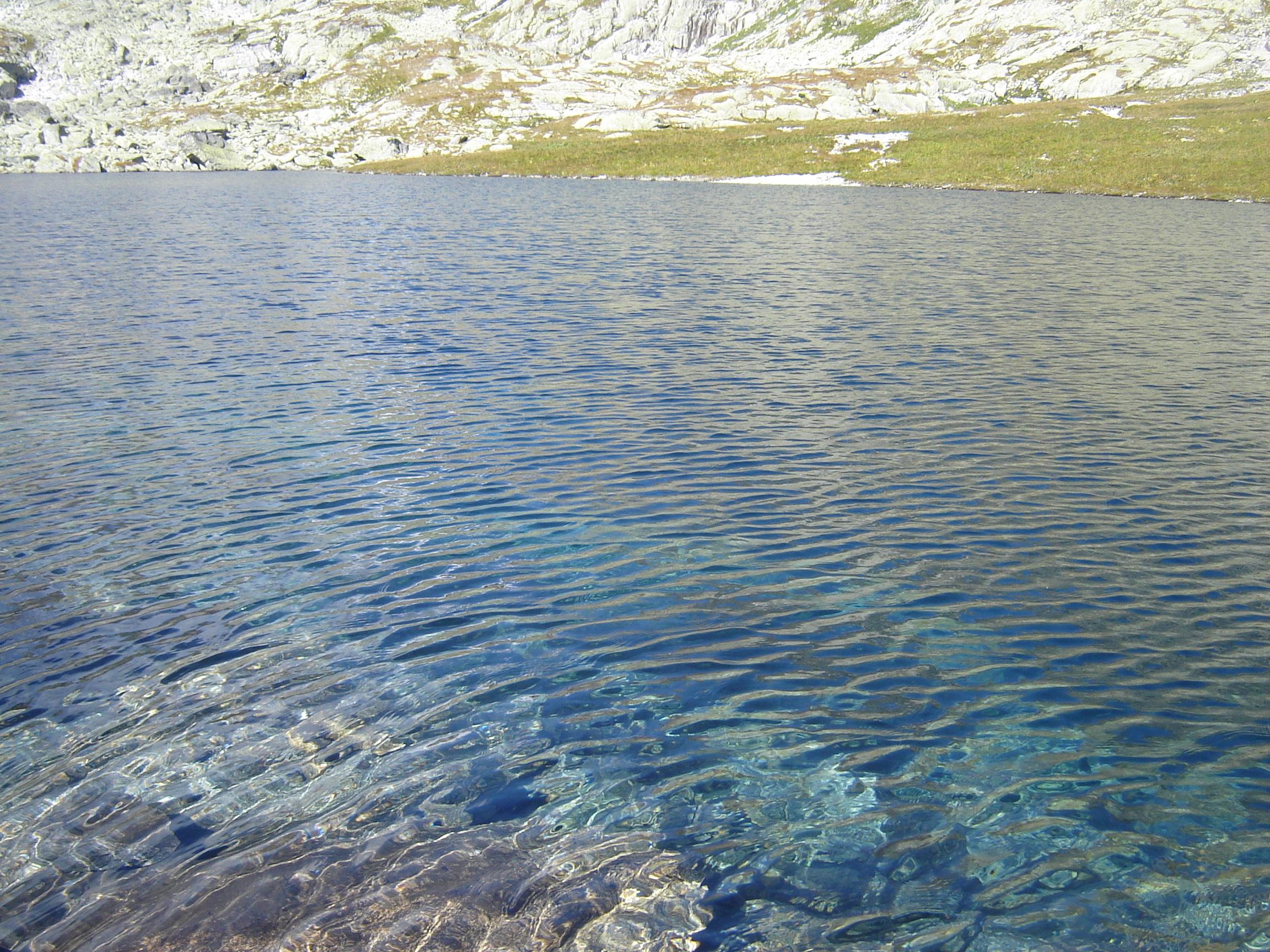 Prostredné Spišské pleso